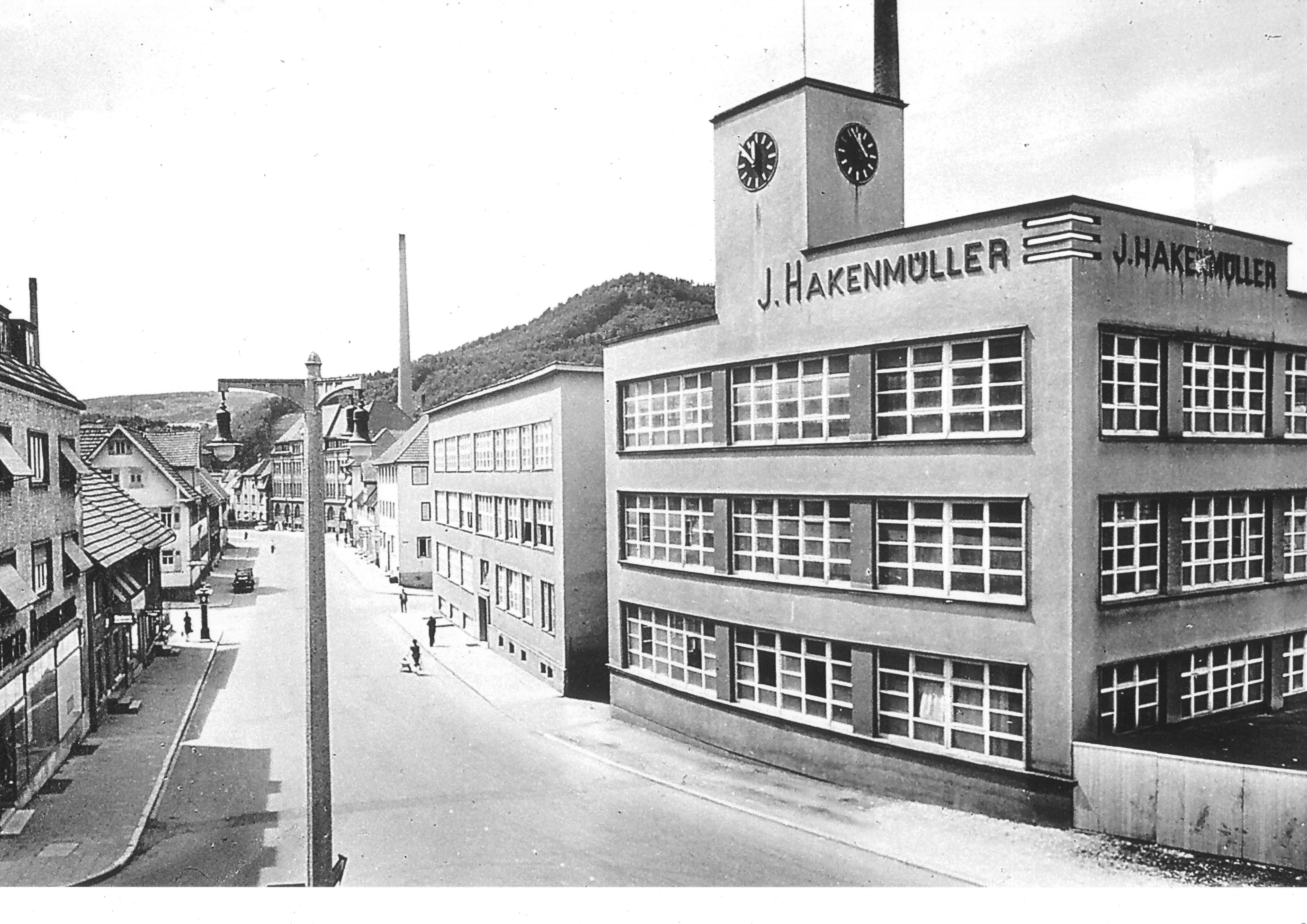 Mit den von dem Tailfinger Architekten Johann Miller entworfenen, 1930 erbauten Produktionsgebäude (links) und 1937 erstellten Verwaltungsgebäude der Textilfabrik von Hasana - J.Hakenmüller entlang der Hauptstraße erhielt Albstadt-Tailfingen ein städtisches Gepräge. Ingrid Helber schreibt in ihrer Dissertation ´Studien zur Industriearchitektur in Albstadt` 1991: "Diese Gebäude hätten den nationalen und internationalen Vergleich nicht zu scheuen brauchen, sondern vielmehr die herausragende Stellung der Gemeinde hinsichtlich ihrer Trikotproduktion in Verbindung mit Industriebauten im Stile des Neuen Bauens manifestiert".